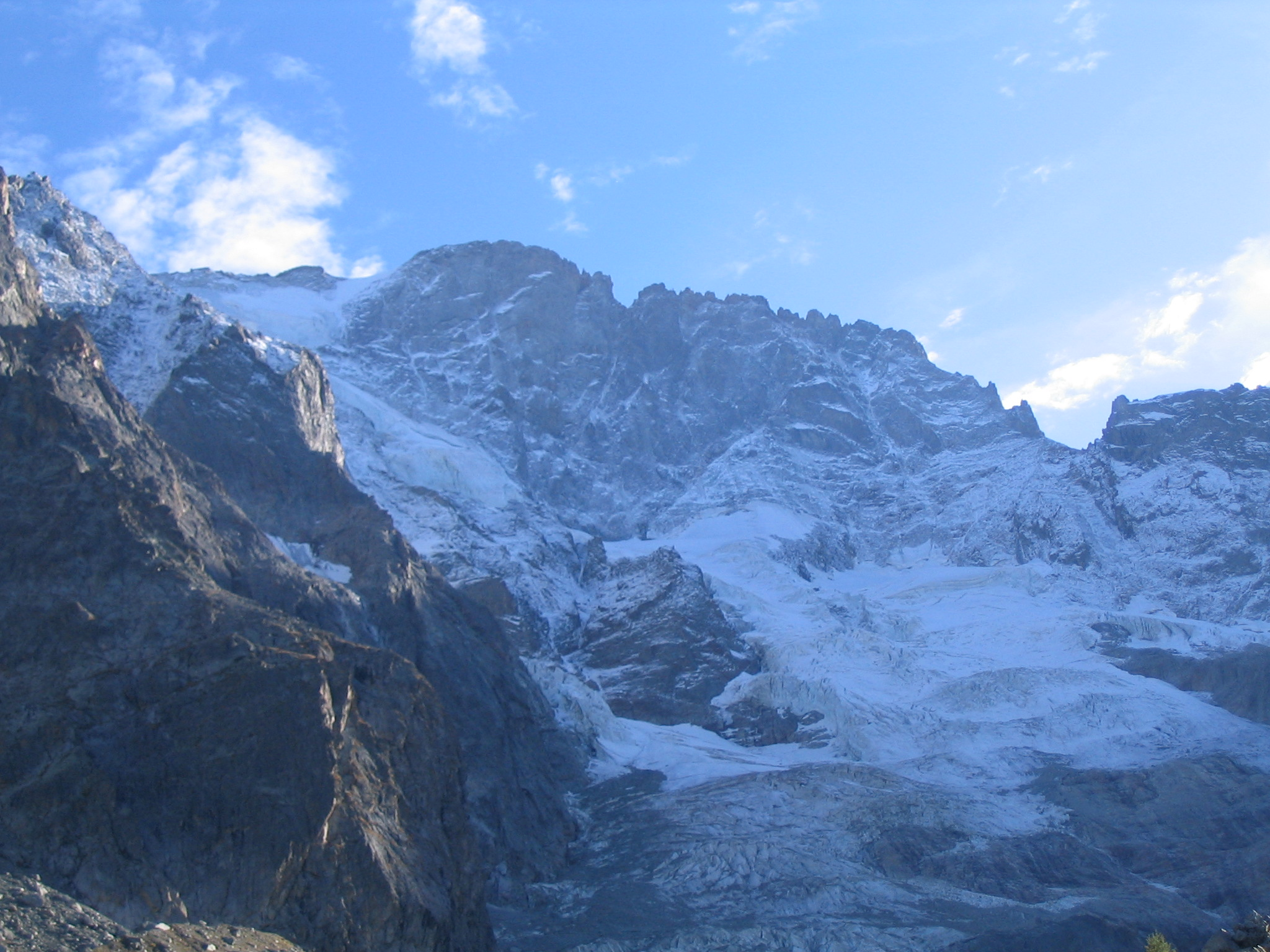 Face nord (Isère, Rhône-Alpes) du Rateau, dans le Massif des Écrins (France).